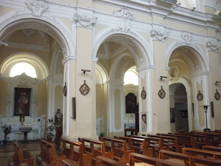 San Giovanni in Fiore - Chiesa Madre, navata laterale sinistra